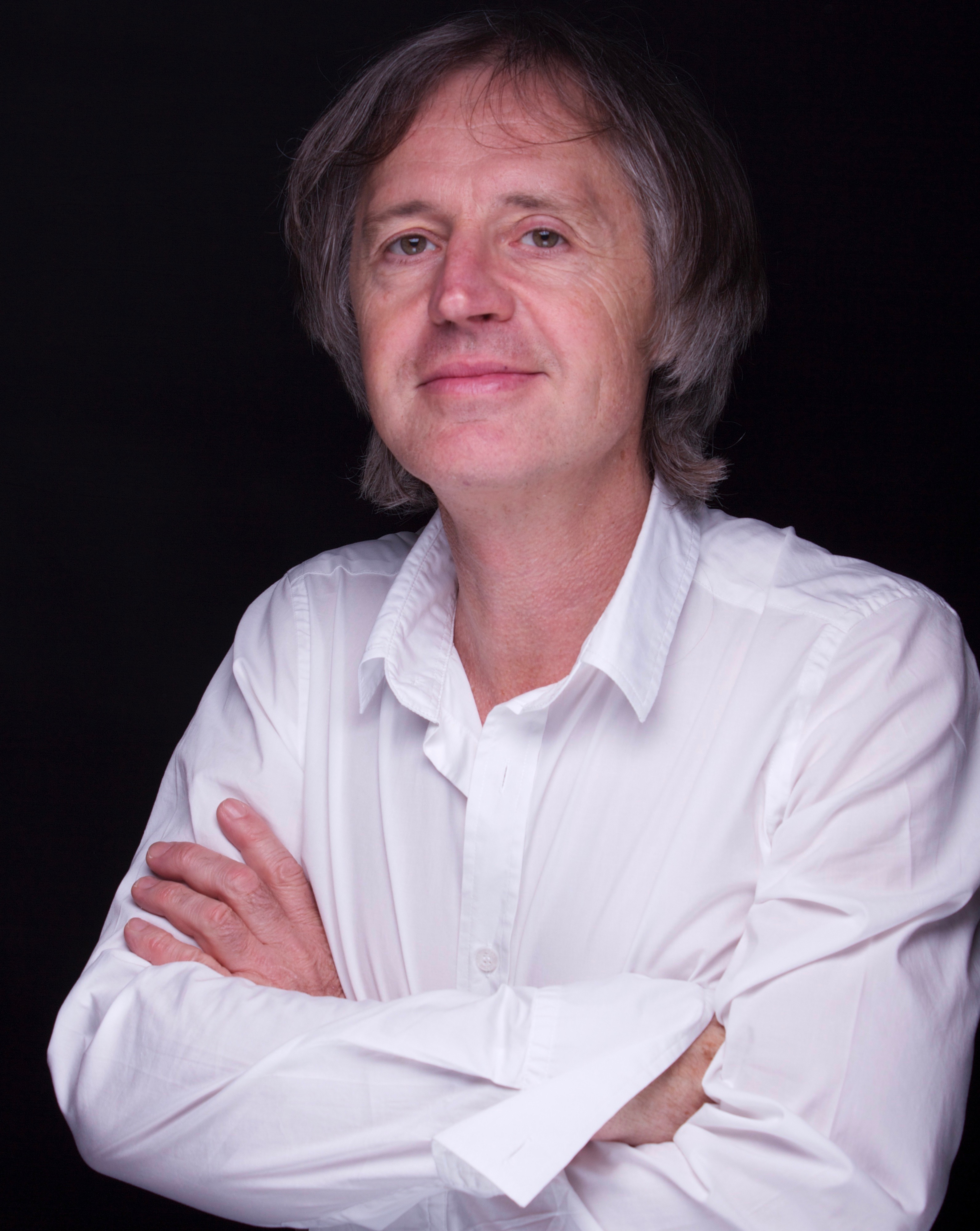 Christian Klippel Autorenportrait